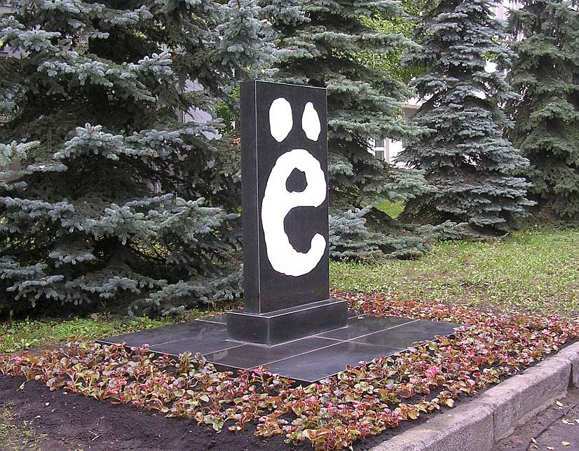 Памятник букве Ё. Первый вариант